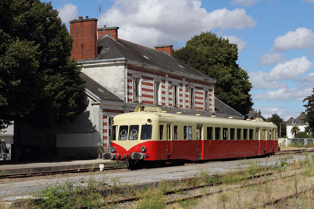 x2403 en gare de Pontivy